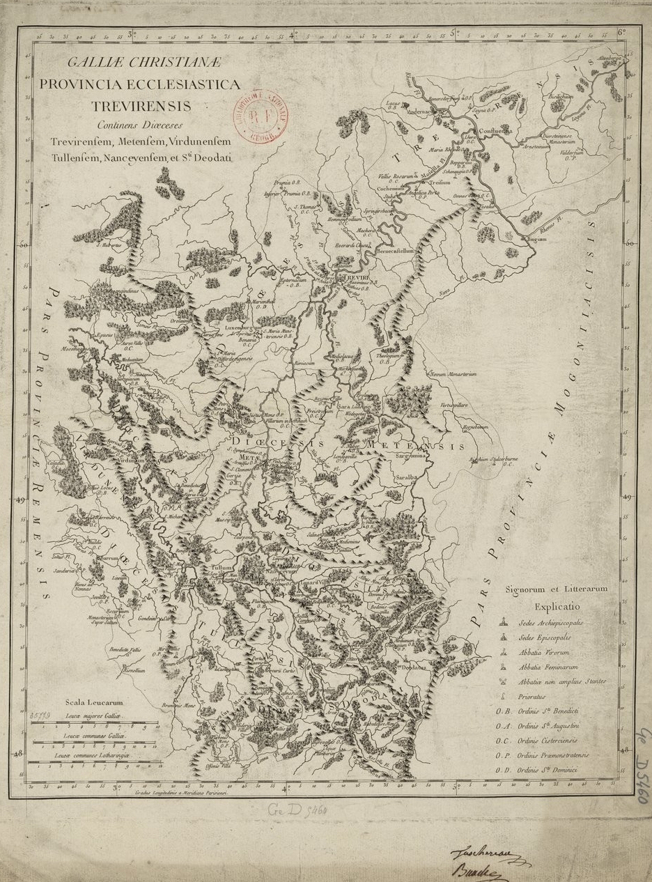 Carte de l'ancienne province ecclésiastique de Trèves, insérée dans la Gallia Christiana (1785).